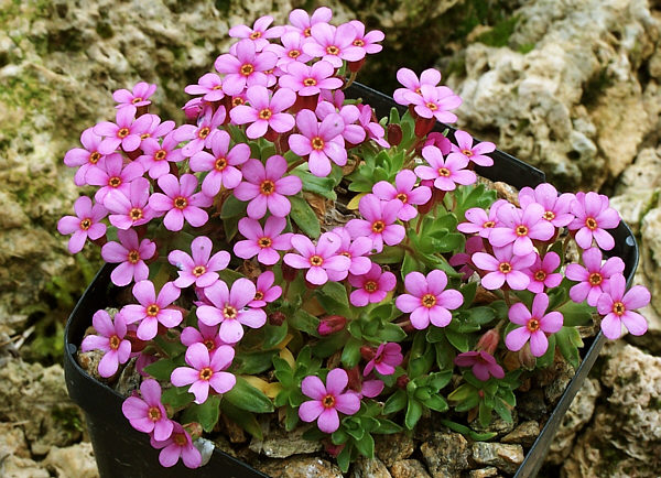 Cette Androsace en coussin est endémique des Pyrénées Orientales ou elle pousse sur les parois rocheuses généralement acide des haut sommets, entre 2500 et 3200 m. Elle mesure 2 à 4 cm. L'intensité de ses fleurs est variable.